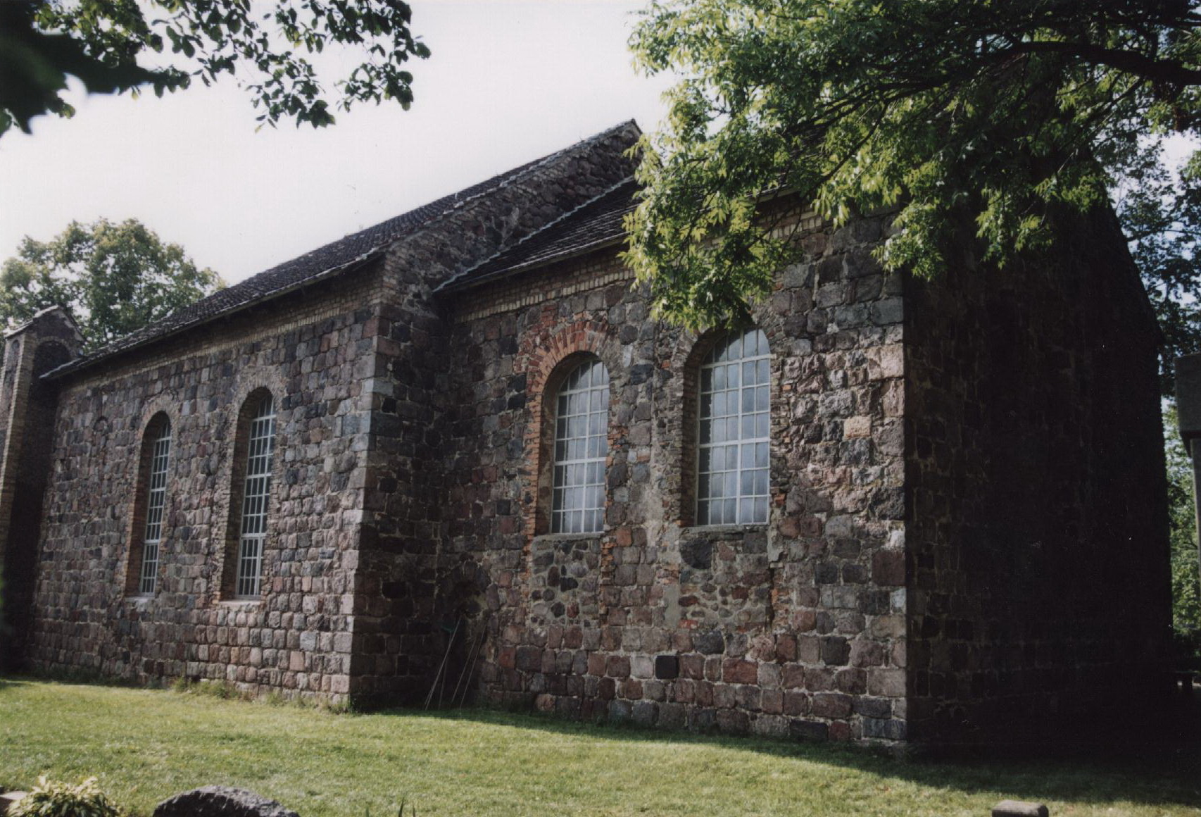 Dorfkirche Hohenstein von Südwesten